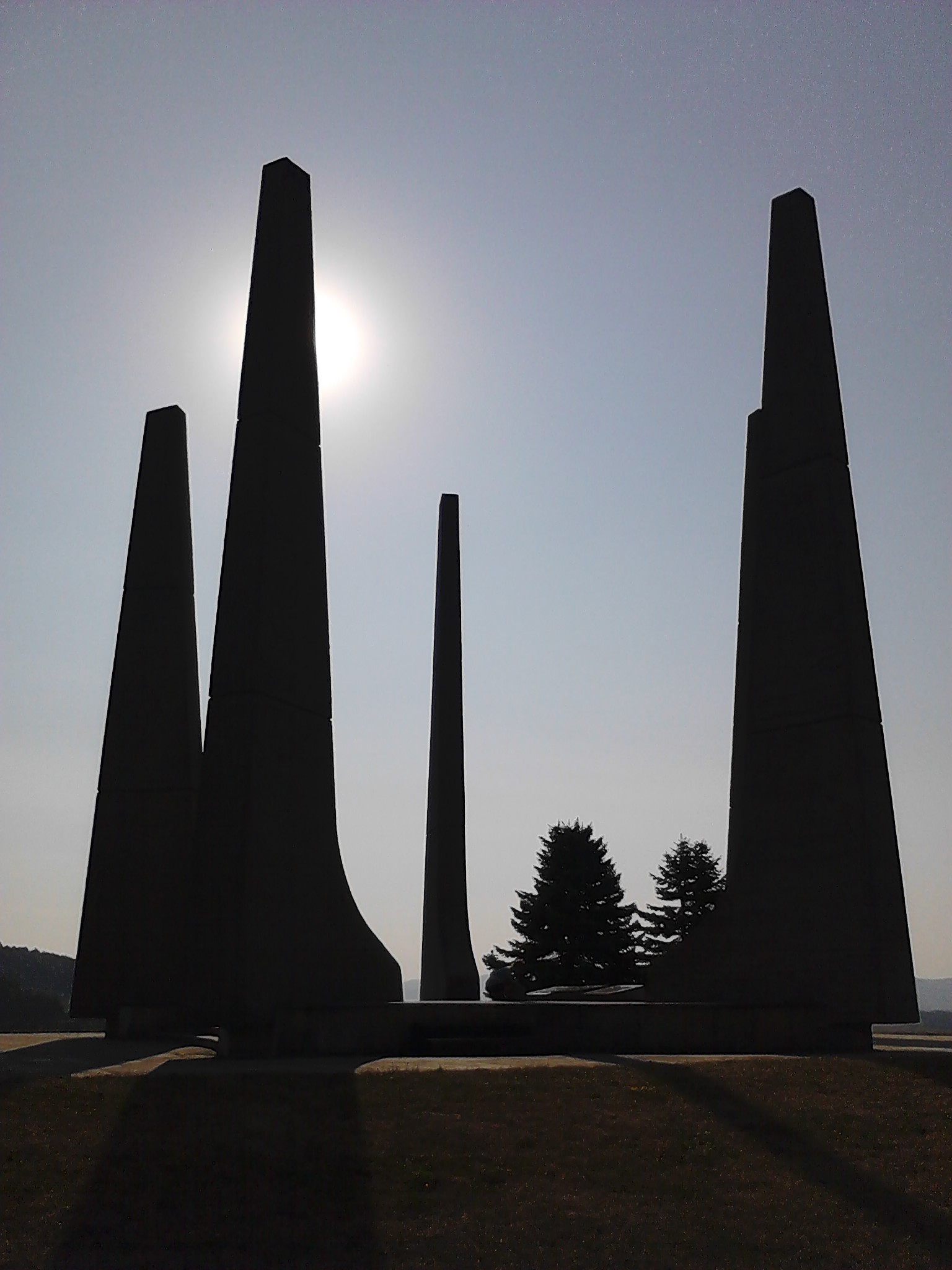 Ploština